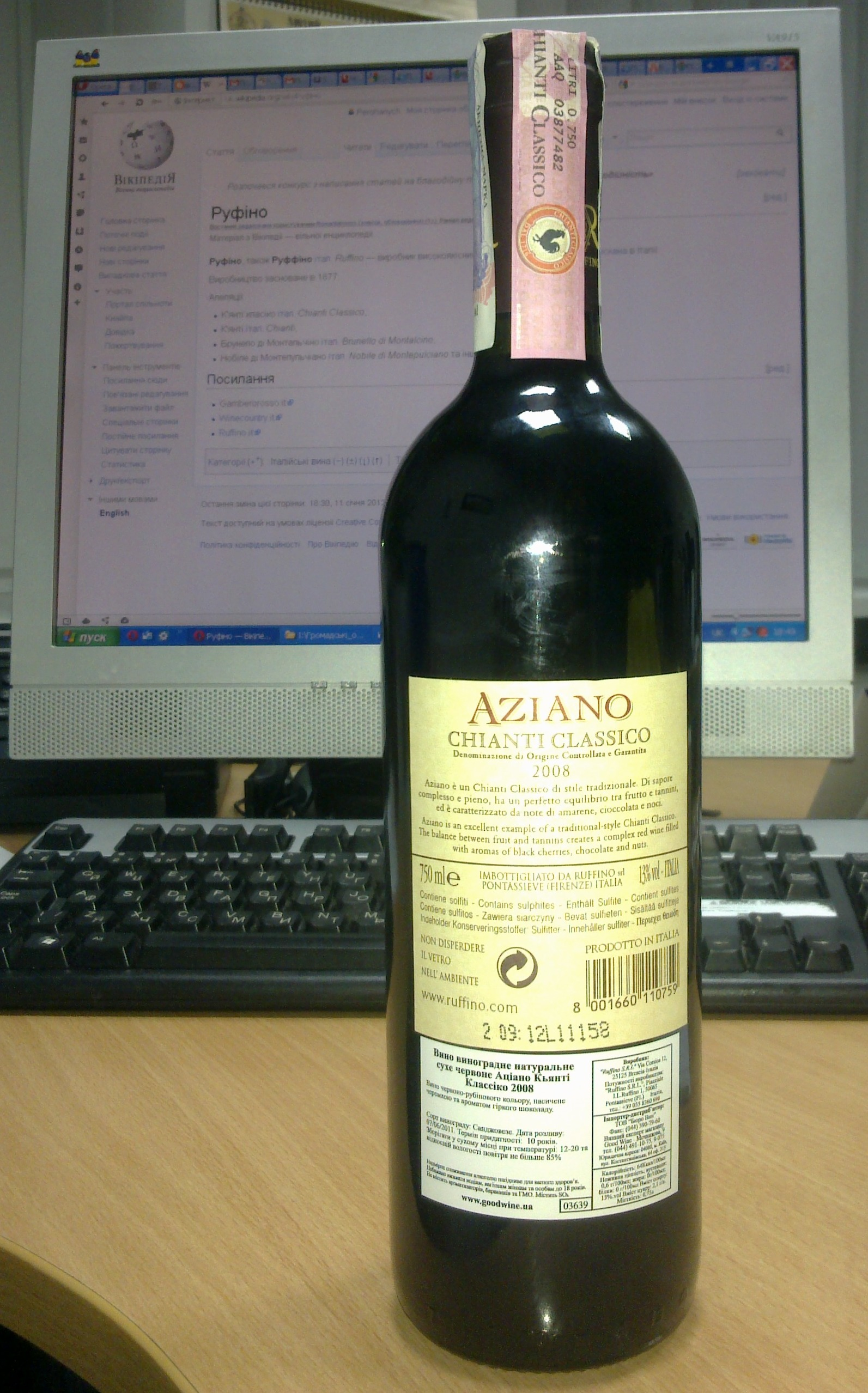 Пляшка з вином Руфіно к'янті класіко урожаю 2008